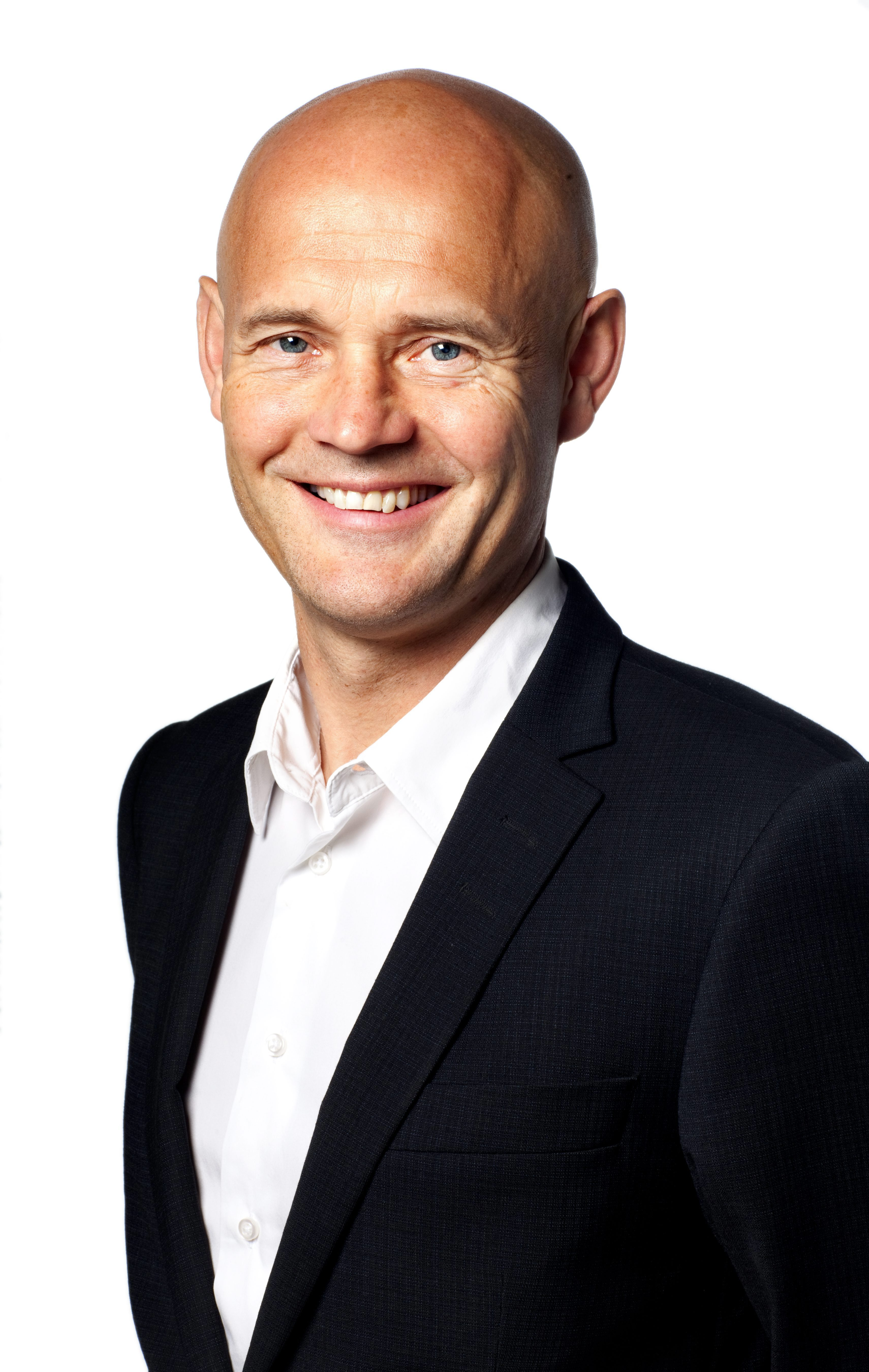 Lars Dahmén, f.d. chefredaktör och VD för Sydsvenska Dagbladet. Sen augusti 2015 VD för Bonnier Tidskrifter.